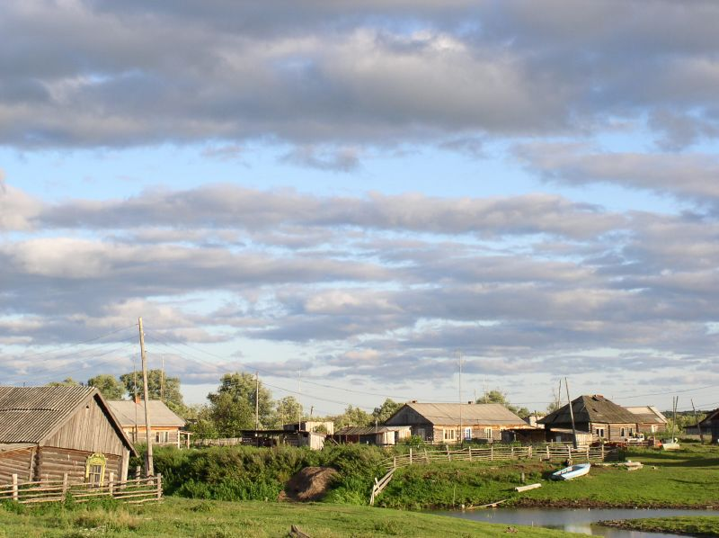 Ivankino, village in siberia, Tomsk oblast, Russia